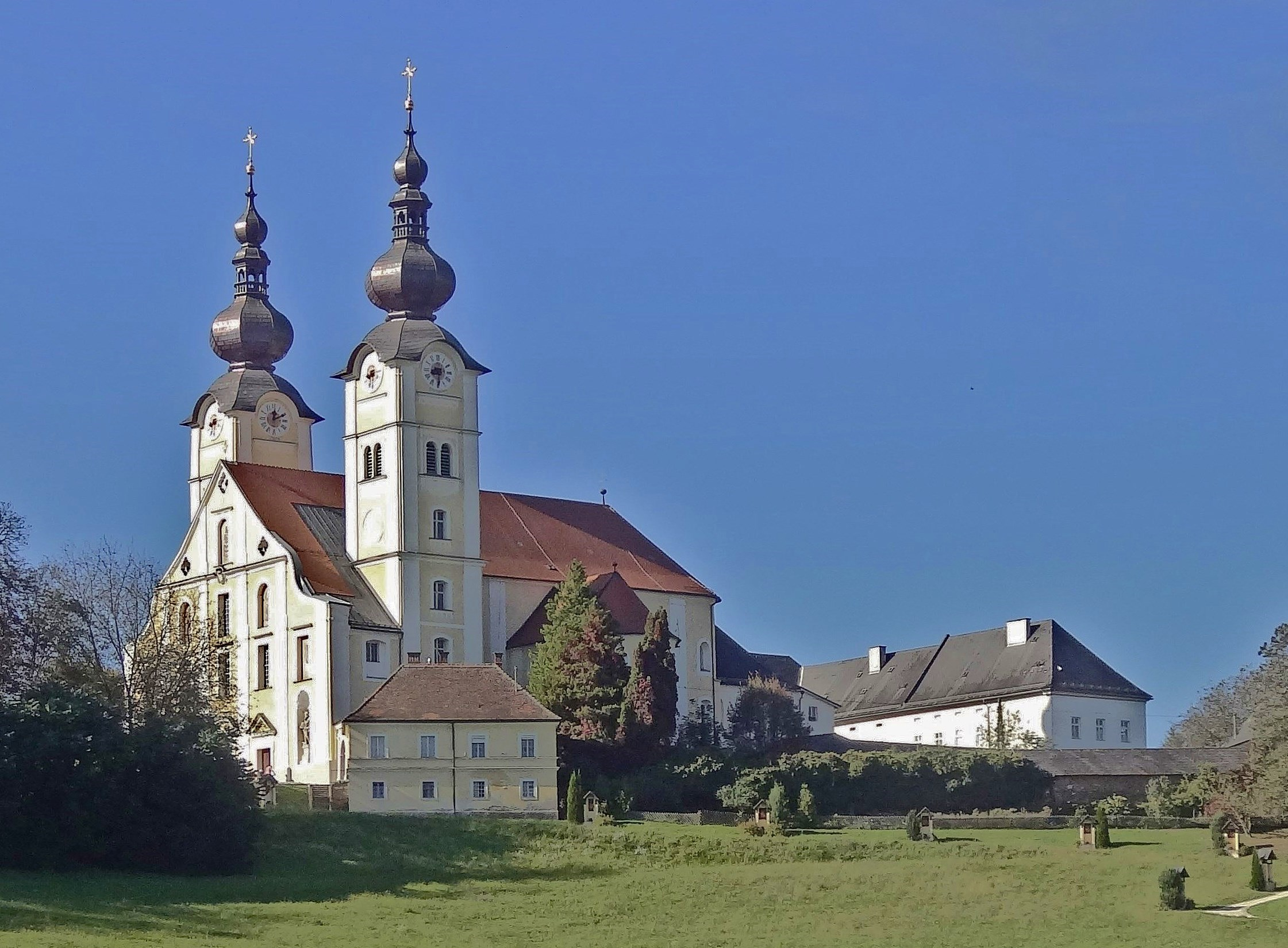 Wallfahrtskirche Maria Loreto (St. Andrä), Ansicht von Südosten